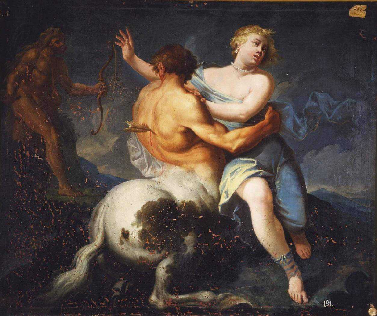 La obra representa el rapto de Deyanira, la tercera esposa de Hércules.